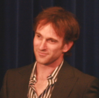 David Oelhoffen, né en 1968, réalisateur et scénariste français